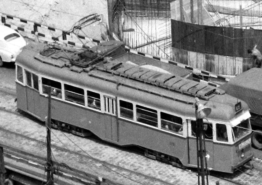 Ganz UZ típusú villamos az Astoriánál